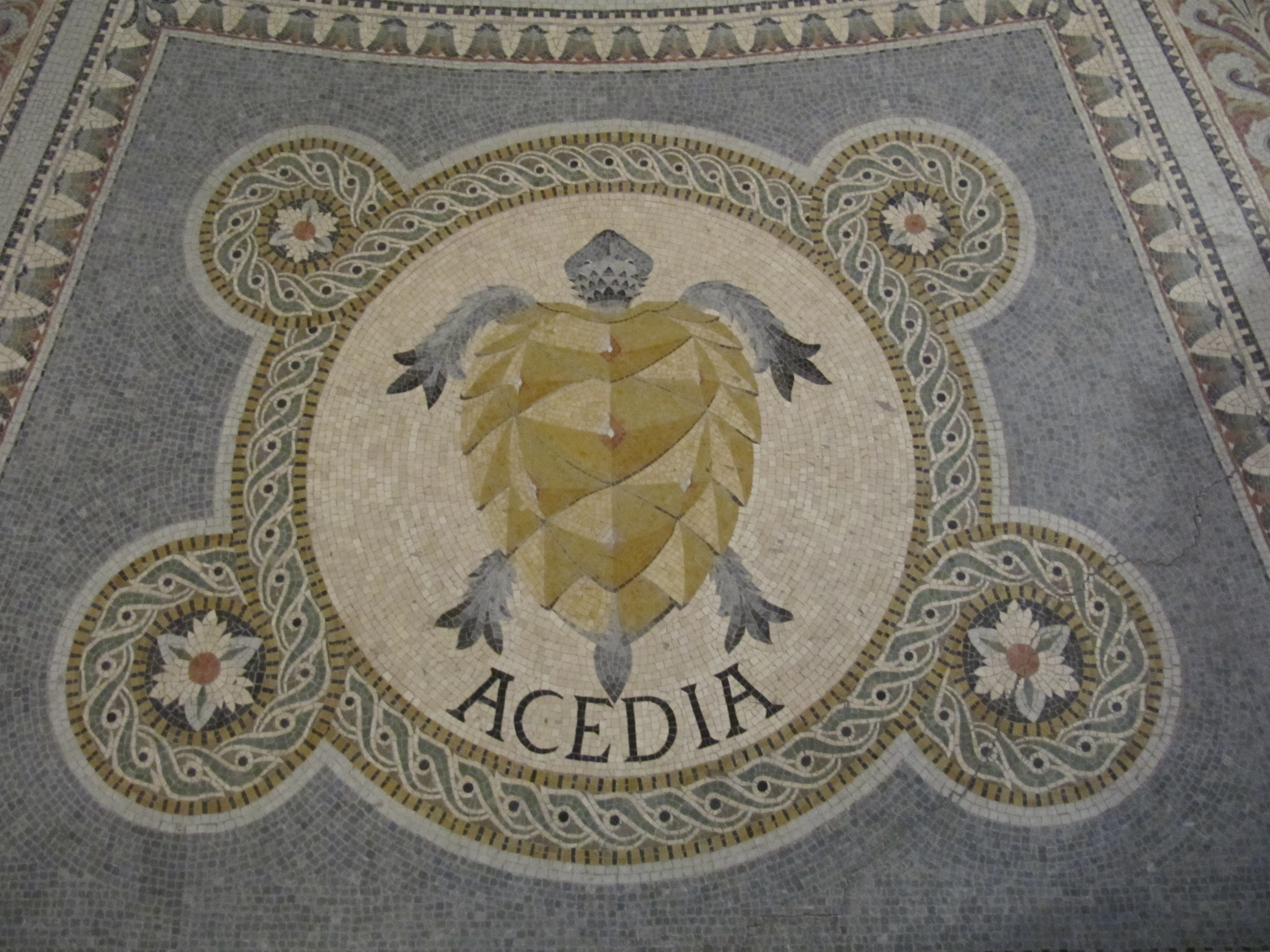 Уныние - мозаика, алтарная часть крипты базилики Нотр-Дам-де-Фурвьер, Лион, Франция